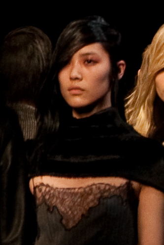 Model Liu Wen, Alexander Wang FW10